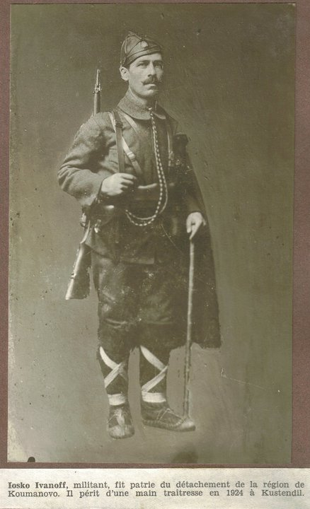 IMRO member Yosif (Yosko) Ivanov